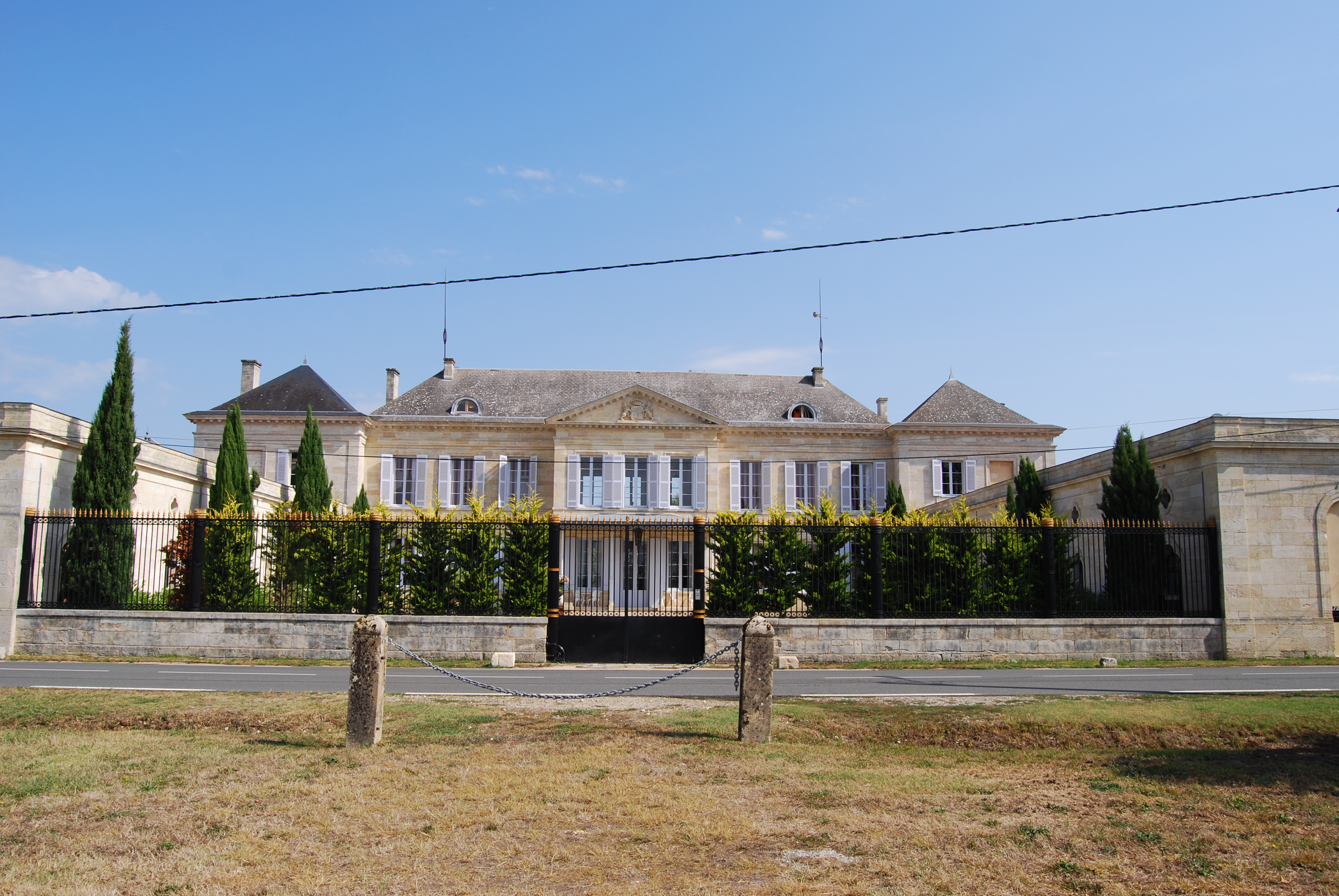 Château Peyronnet, (Inscrit, 2005) .